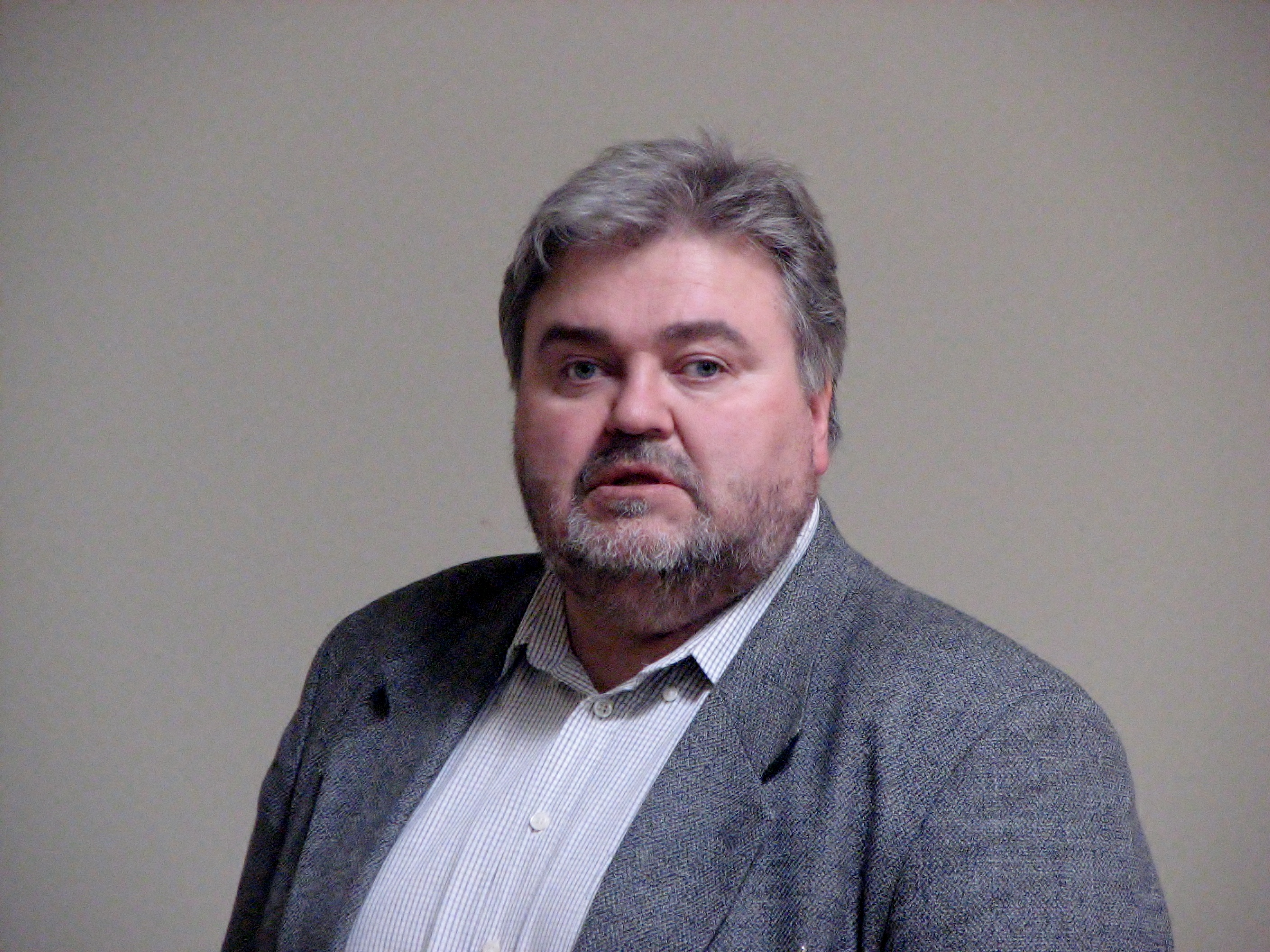 Andres Adamson esinemas Tallinna raamatumessil 5. aprillil 2013